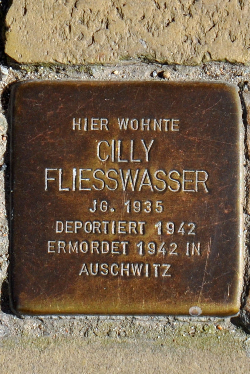 Stolperstein für Cilly Fliesswasser in Stralsund.